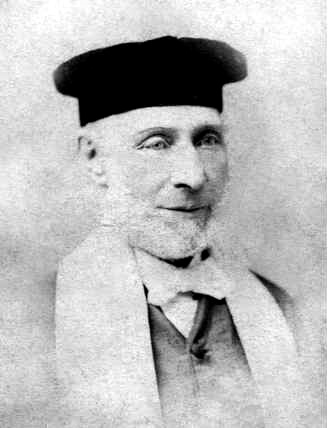 Jakob Fränkel (1808-1887), 1. Militärrabbiner der USA